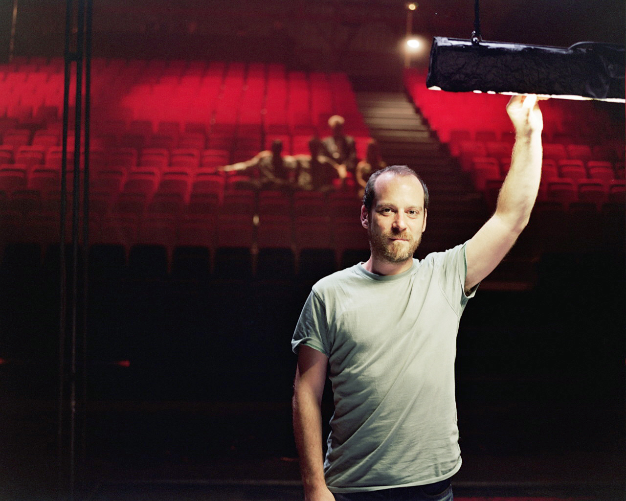 Portrait Arthur Nauzyciel - Crédit Frédéric Nauczyciel